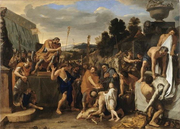 Charles Le Brun, Mucius Scaevola devant Porsenna, huile sur toile, 1643 - 1645, 95 x 133 cm, Mâcon, musée des Ursulines.